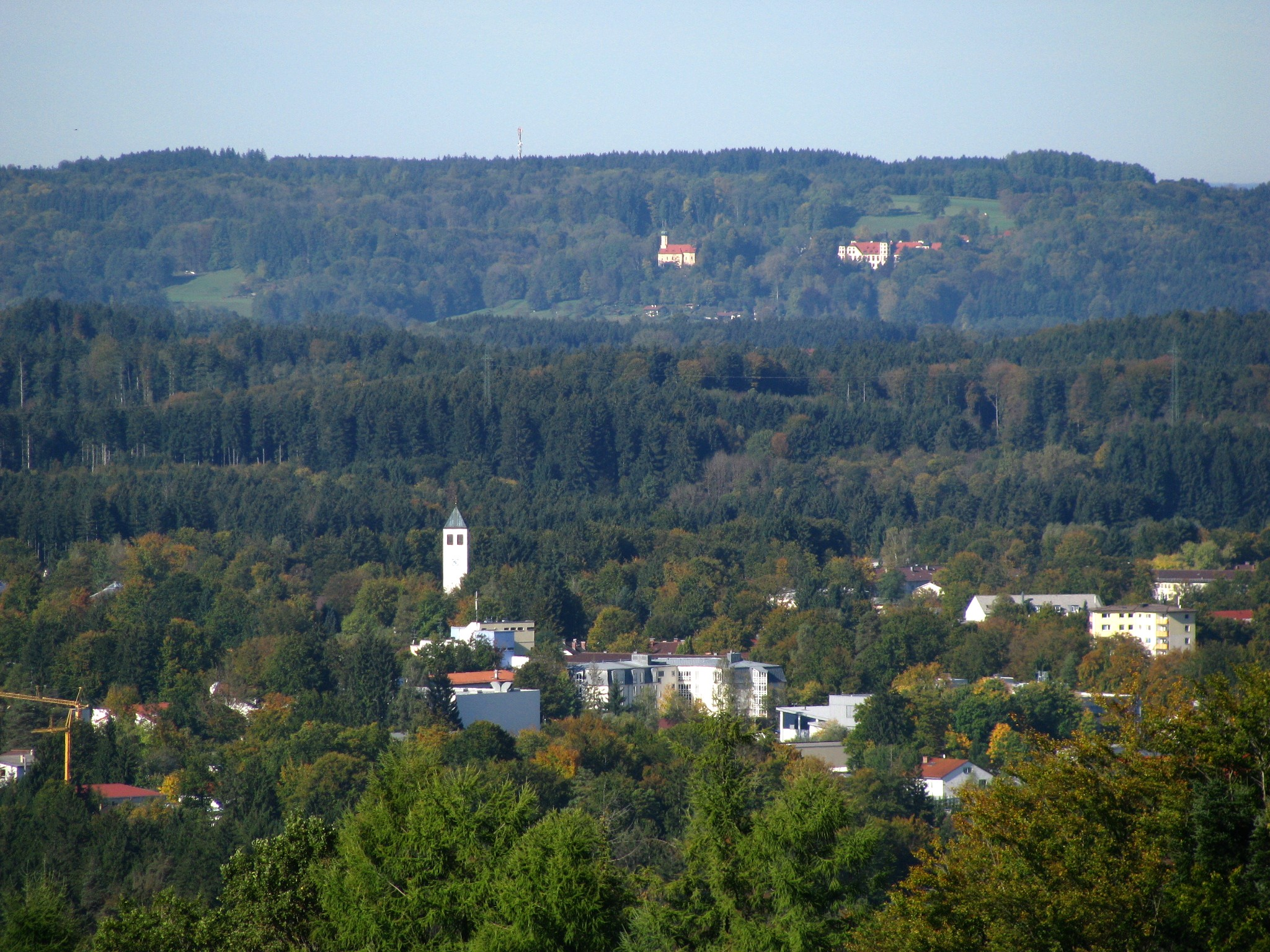 Blick von der Peretshofener Höhe nach Westen: Vorne Geretsried im Isartal mit der Kirche Maria Hilf, hinten Schloss Eurasburg und Schlosskirche